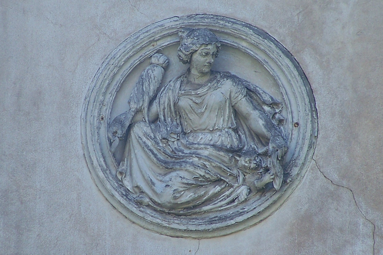 Das dritte Medaillon in der Westfassade.